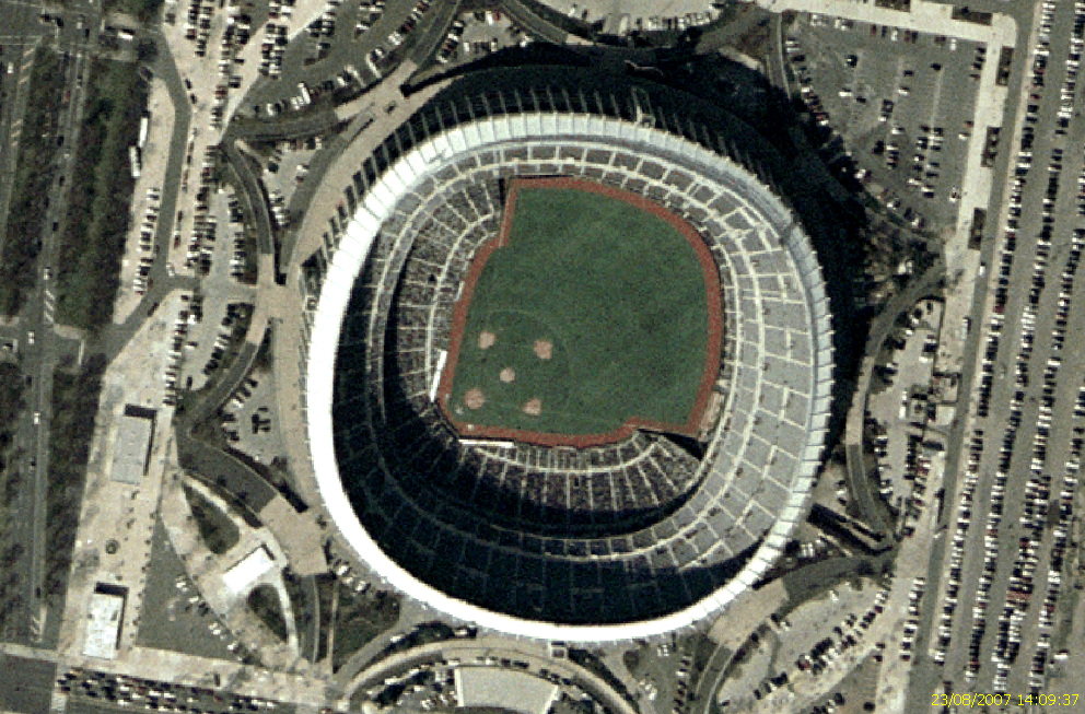 Image satellite du Veterans Stadium. Image satellite USGS ortho (date févr-avril 2002) Nasa World Wind